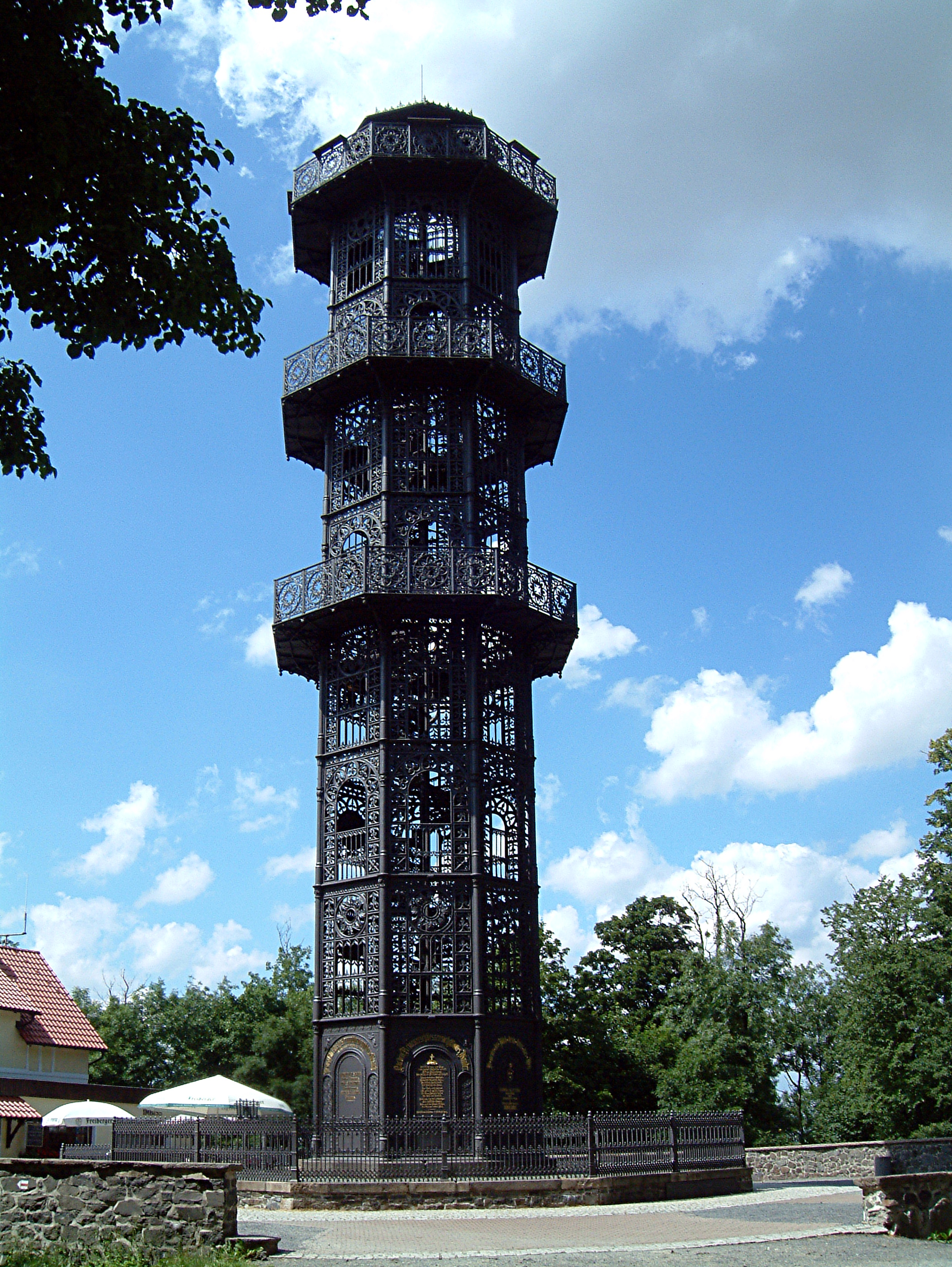 King-Friedrich-August-Tower